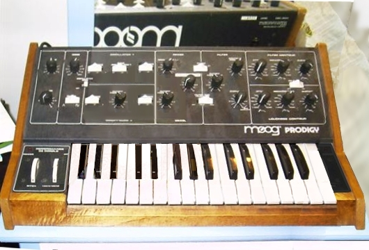 Moog Prodigy i miss my moog